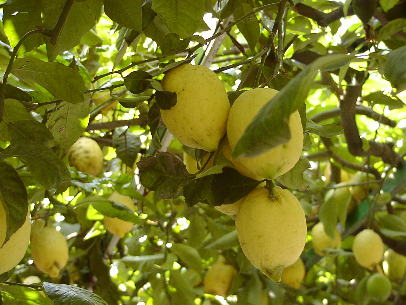 Sfusato Amalfitano, lemon